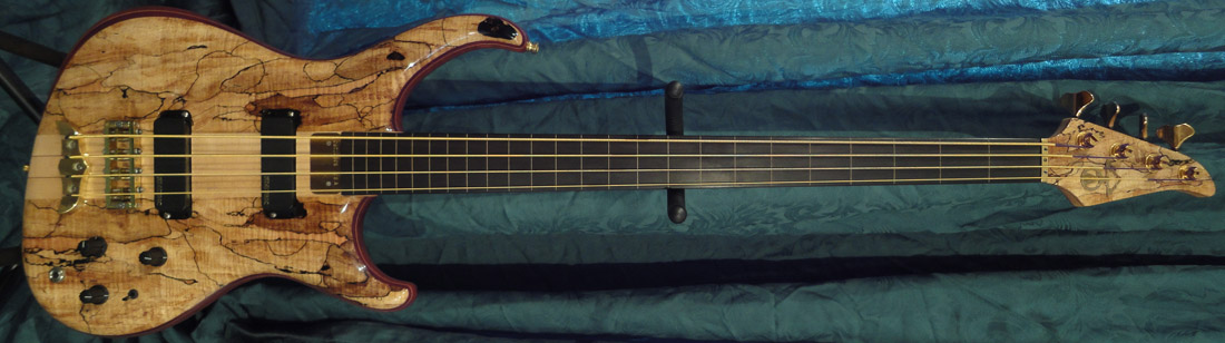 2006 Custom neck through Orion, fretless, Spalted Maple top